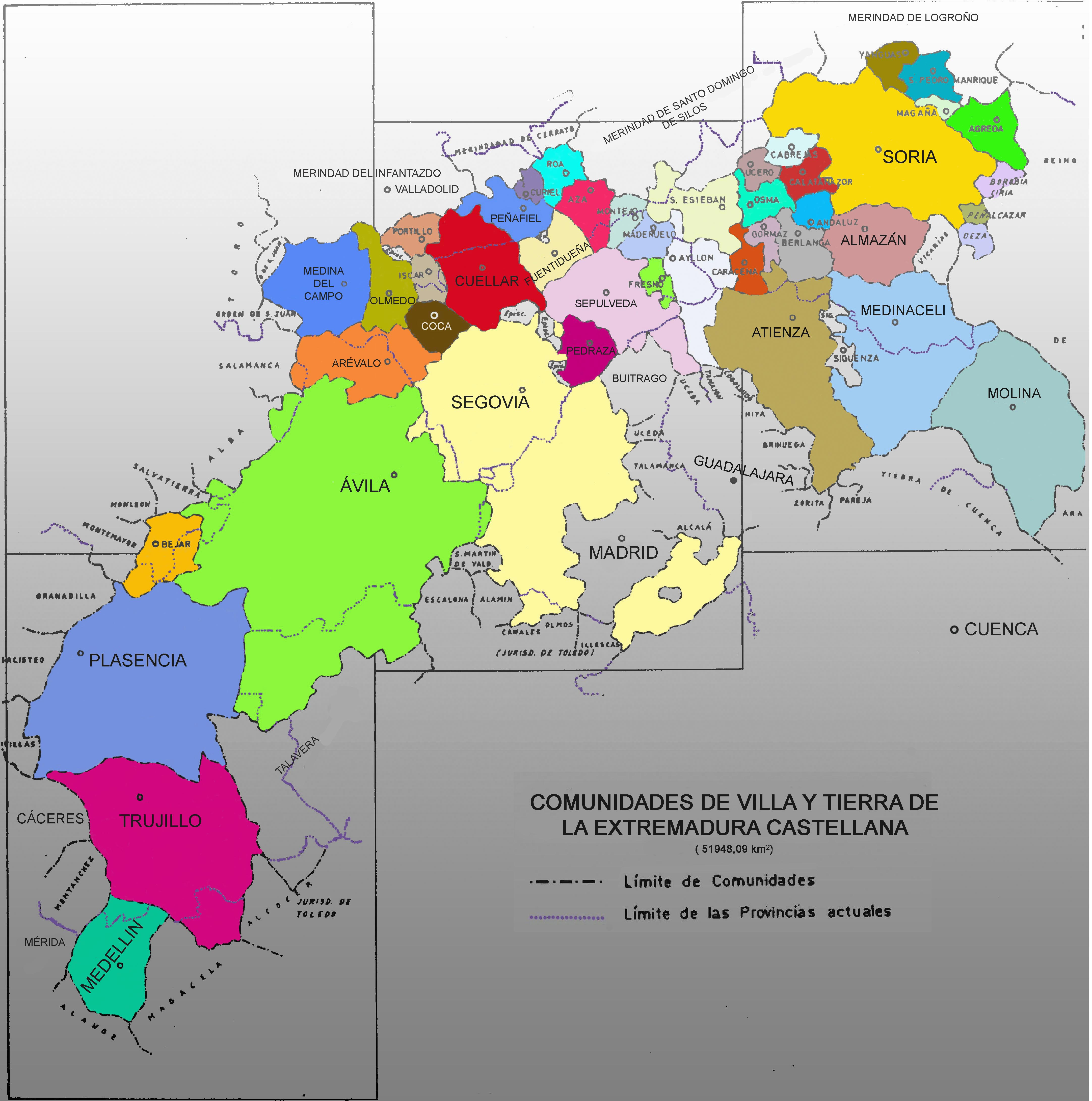 Comunidades de Villa y Tierra de Castilla (s.X-XII) autor=Carlosblh source=Trabajo propio